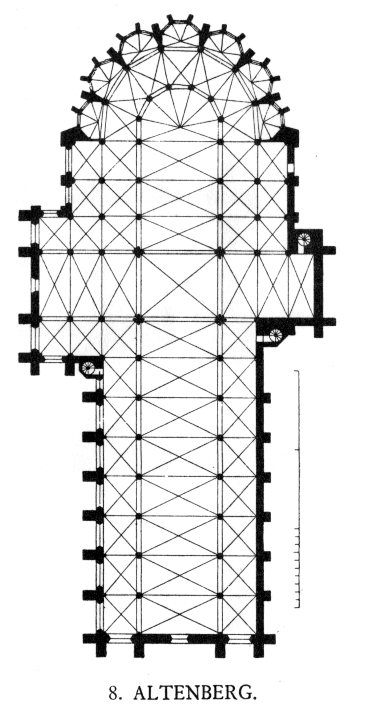 Altenberg